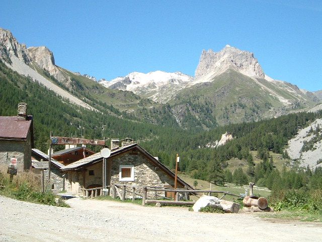 Vallée étroite